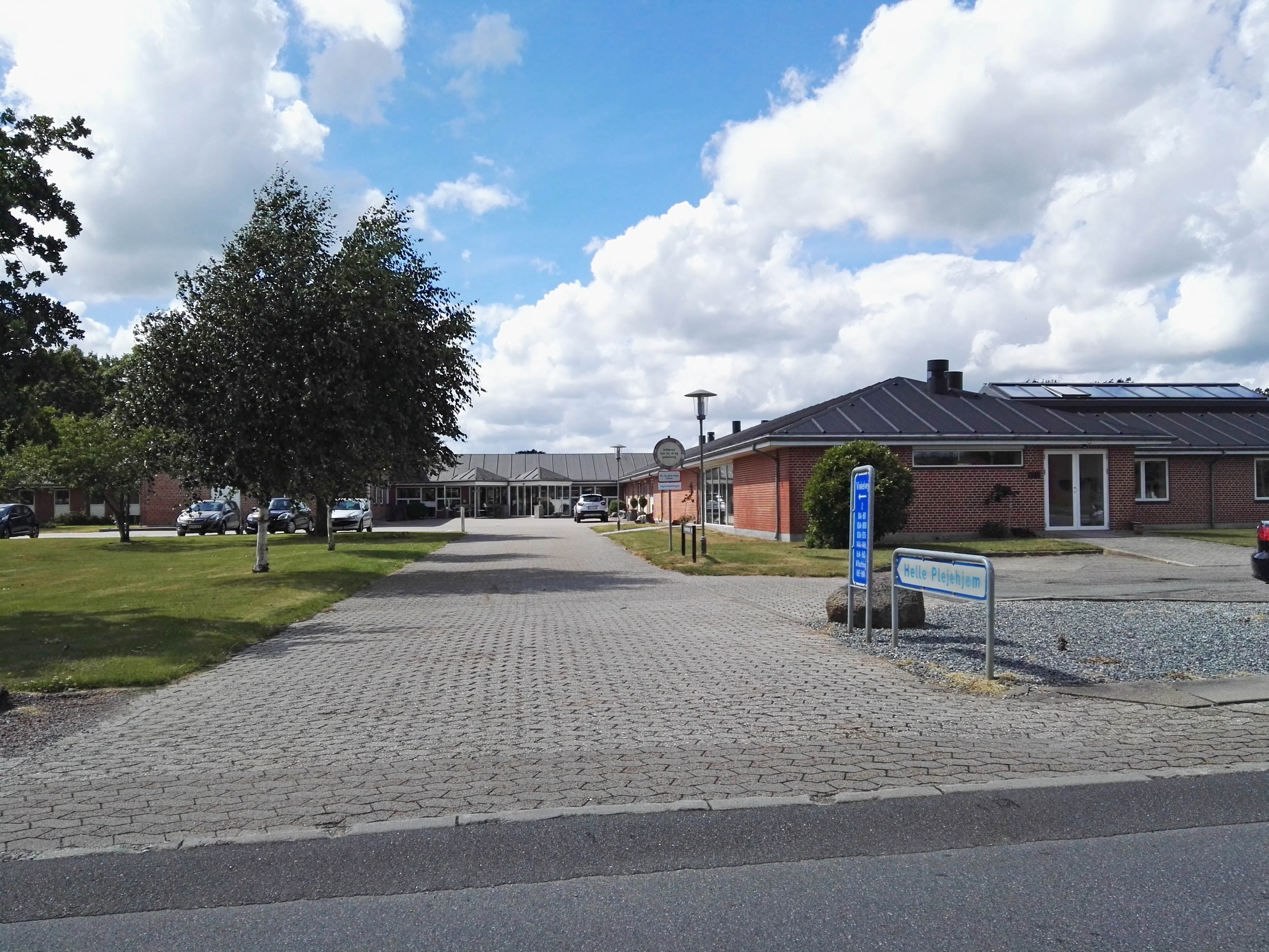 Helle Plejehjem i Tofterup